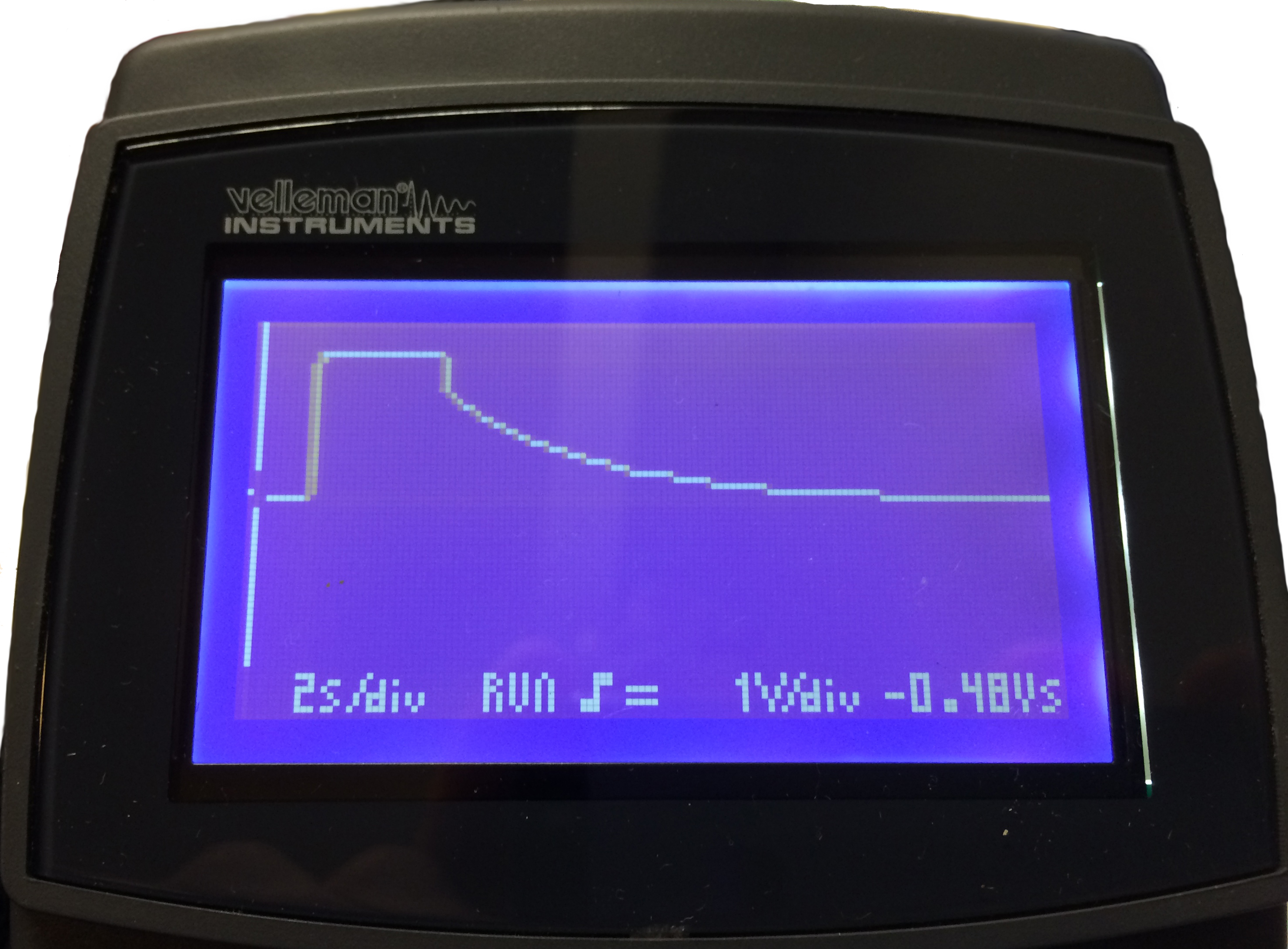 Oscilloscoop